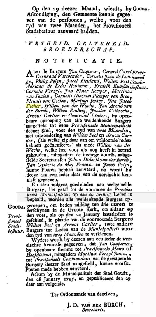 kopie Nederlandsche jaarboeken deel 30